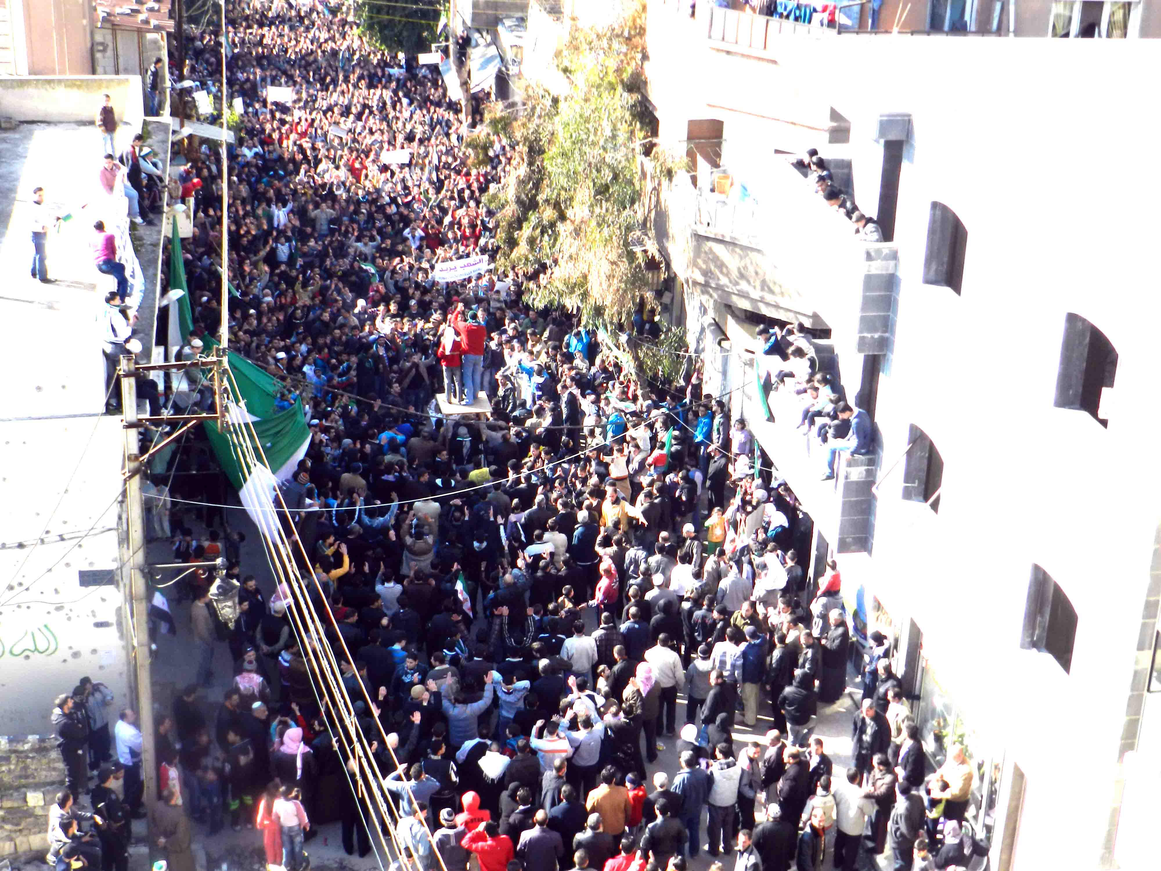 صورة تظهر مظاهرة حاشدة في حي باب الدريب بمدينة حمص في سوريا ضمن الثورة المطالبة بإسقاط النظام هناك